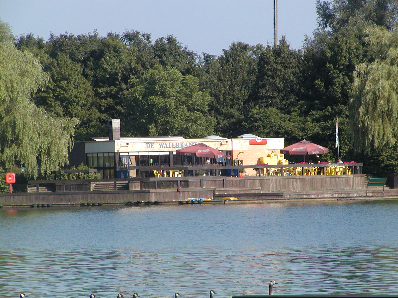 Blaarmeersen Gento - trinkejo Waterkant aŭtoro: Yves NEVELSTEEN dato: julio 2005